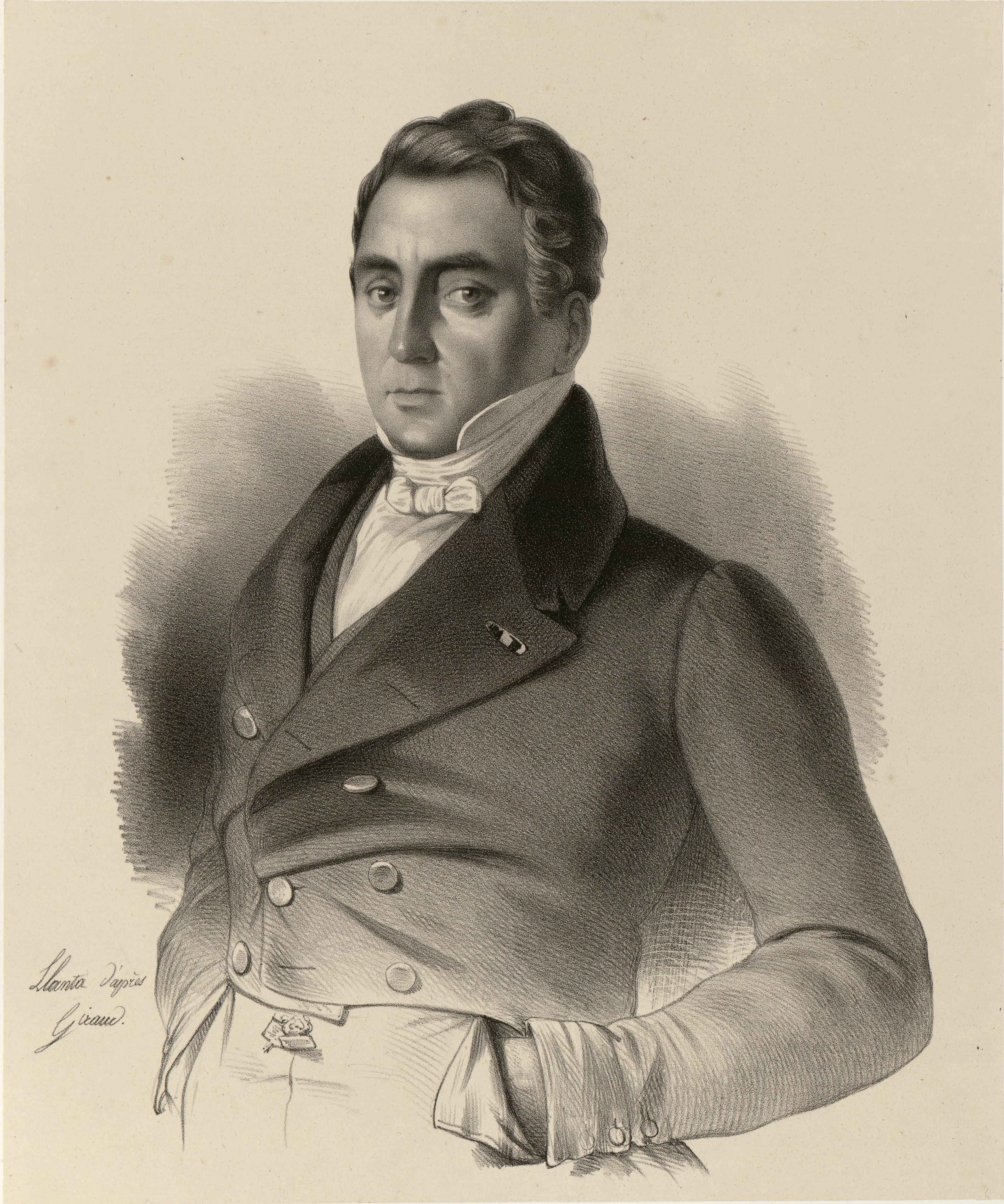 Illustrasjon hentet fra boken "Voyages de la Commission scientifique du Nord, en Scandinavie, en Laponie, au Spitzberg et aux Feröe" av ukjent forfatter og utgitt av Arthus BertrandParis : Arthus Bertrand, [1852] (Paris, [1852])